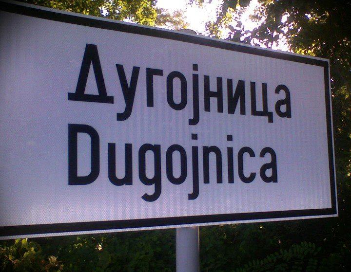 Дугојница.